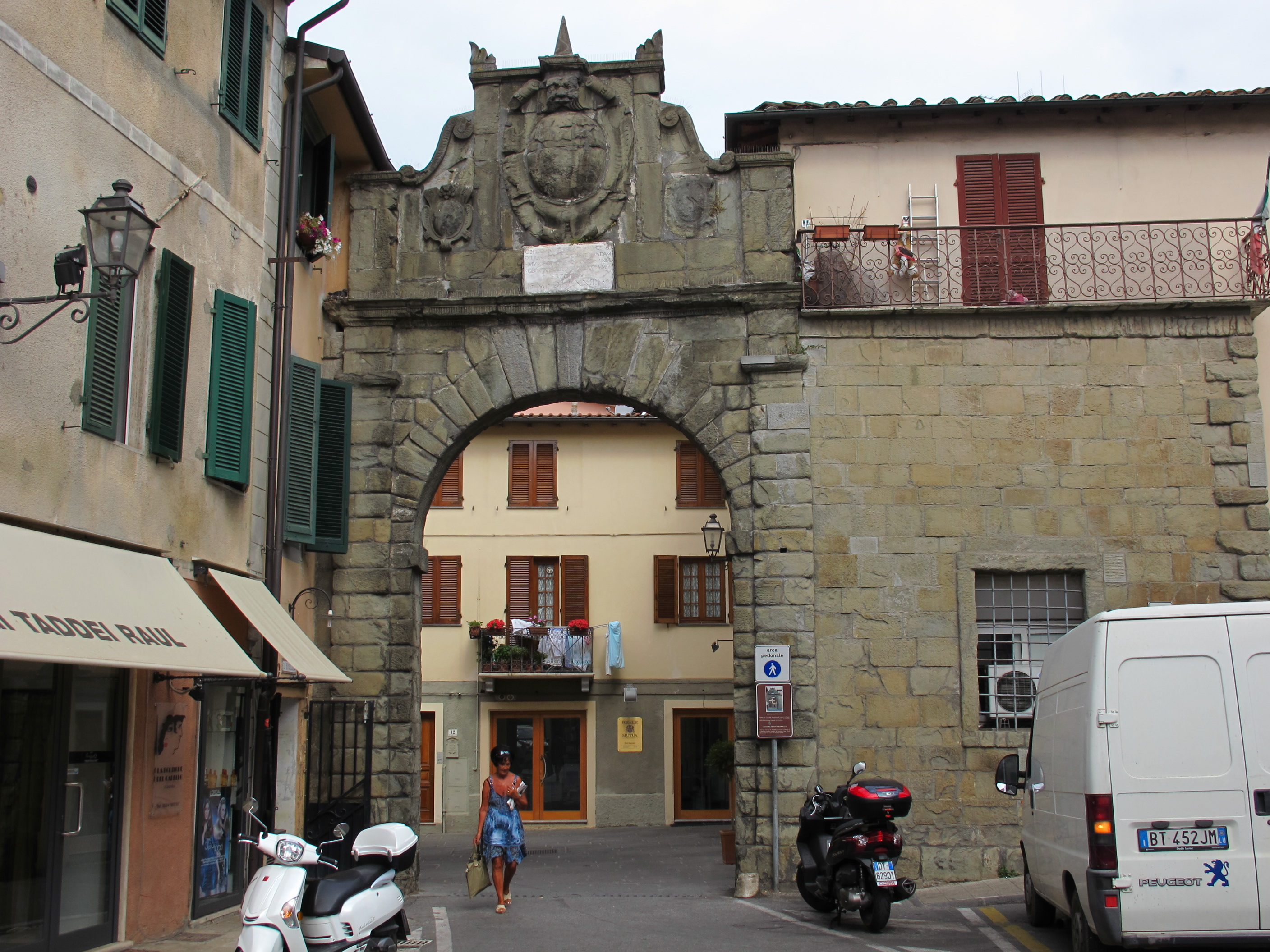 Camaiore, arco di trionfo